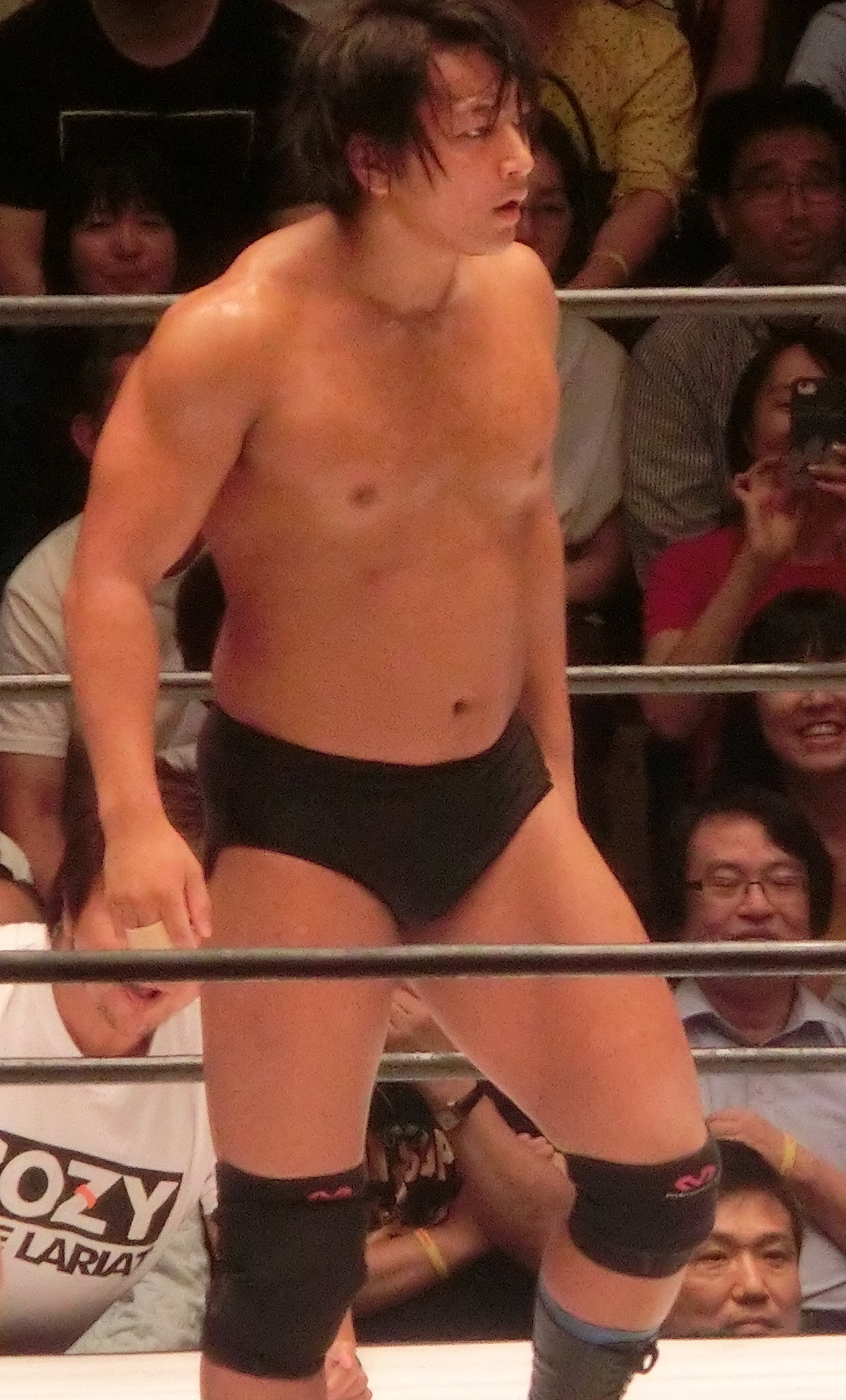 2018年8月31日、後楽園ホール